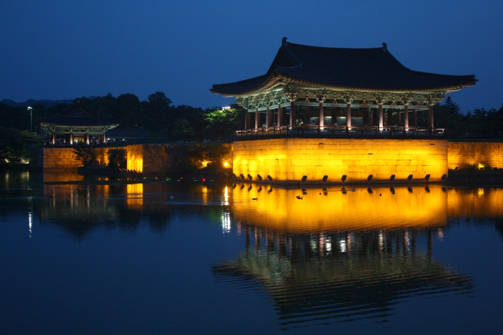 Gyeongju, siehe [1]